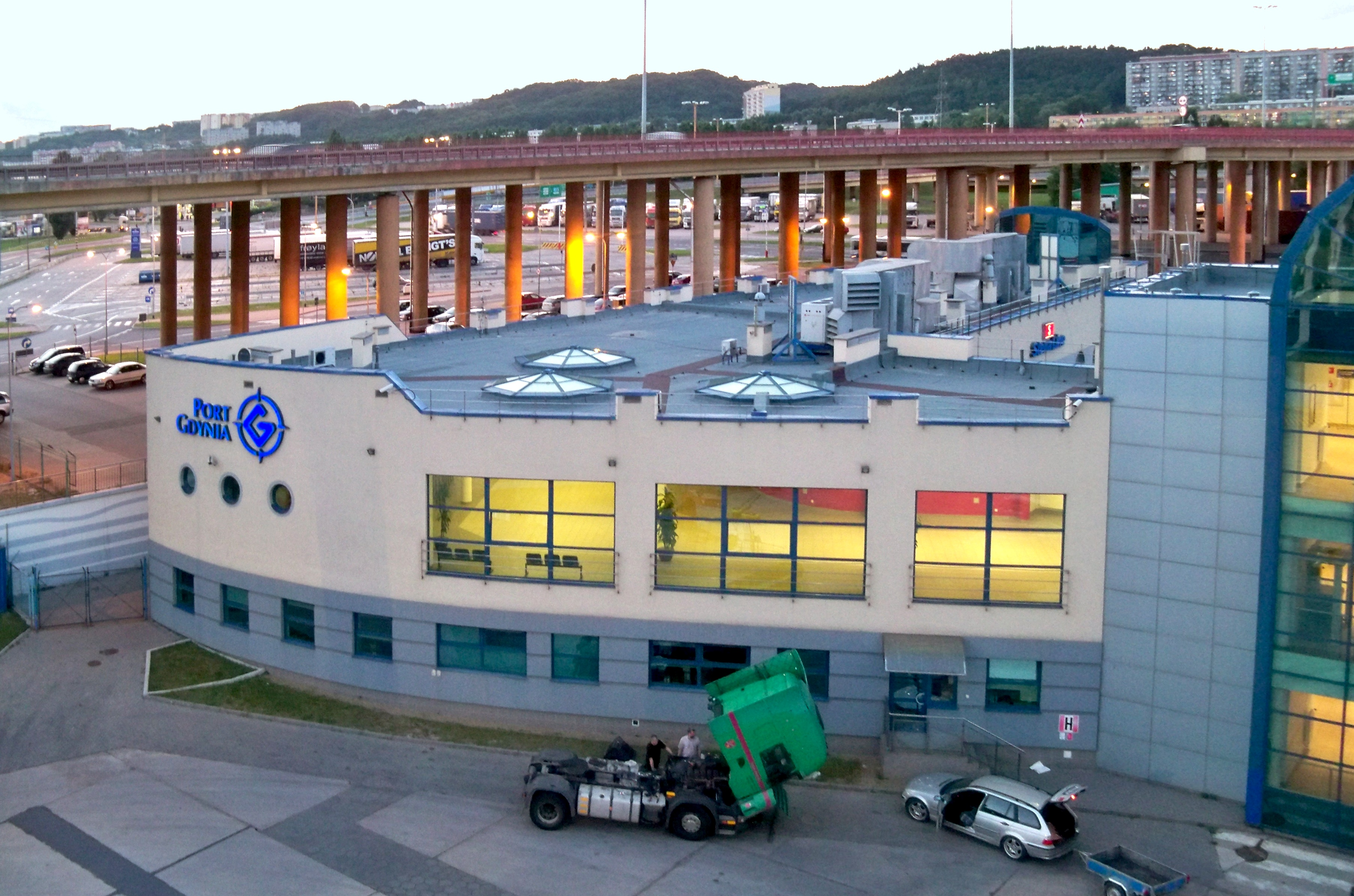 Terminal Promowy w Gdyni. W tle estakada Trasy Kwiatkowskiego i Gdynia-Chylonia.